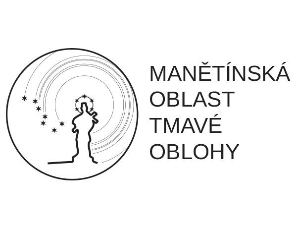 Logo zobrazuje barokní sochu, typickou pro manětínsko, na pozadí star strails.